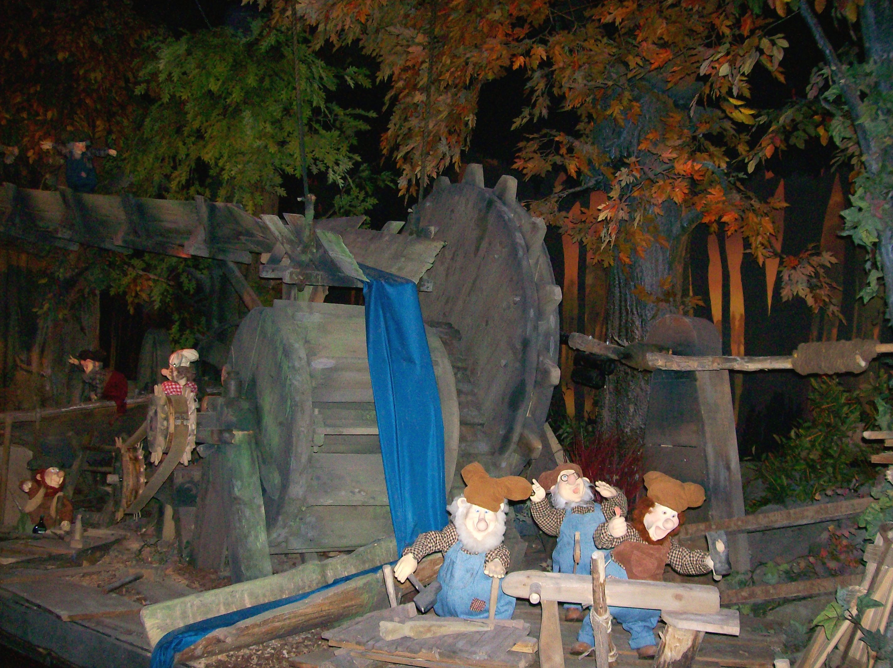 Foret de Plop moulin à eau